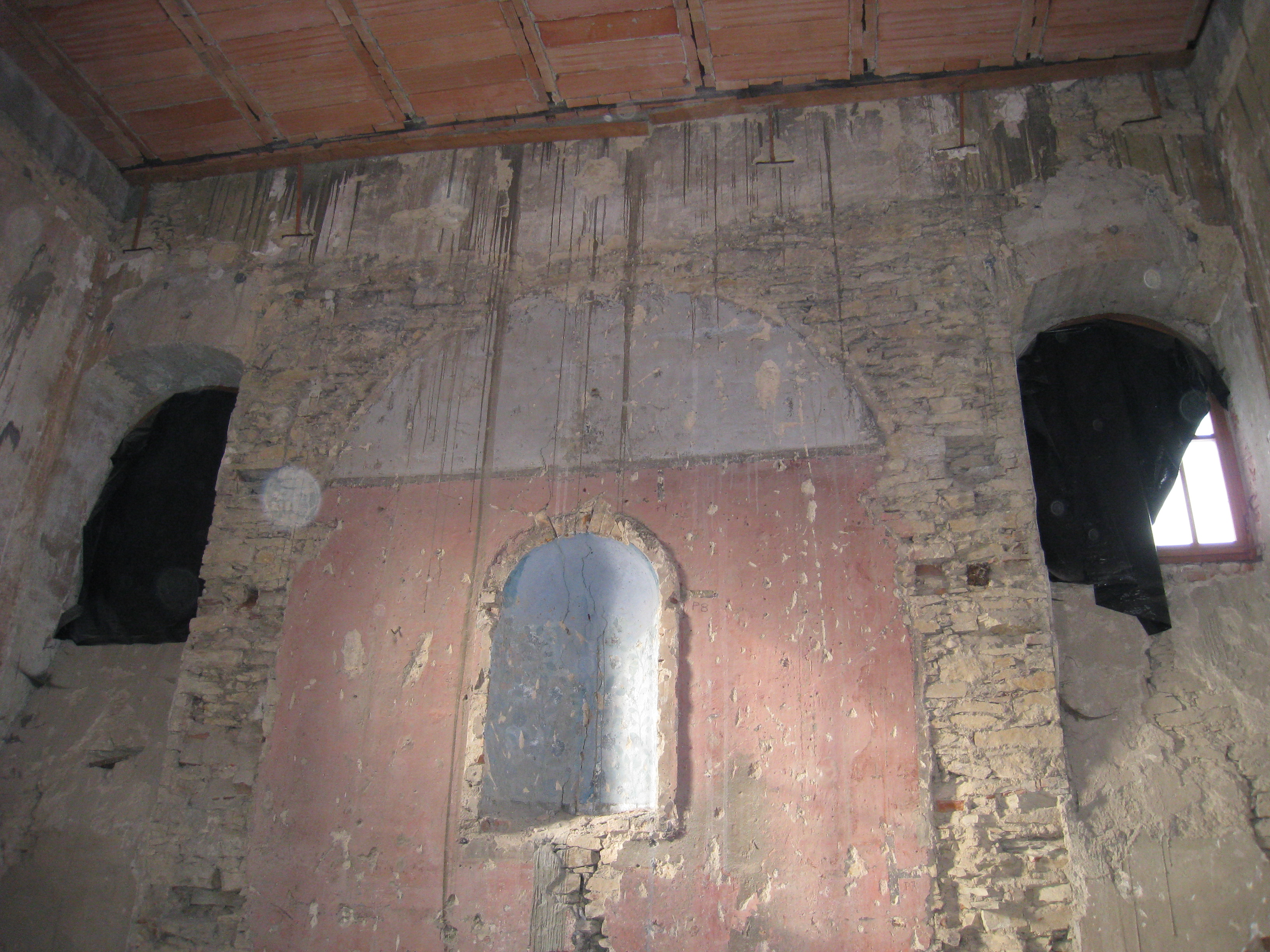 Pohled na zadní stranu Lorety v kostele sv. Josefa v Chrudimi, nyní Muzea barokních soch, před zahájením rekonstrukce v letech 2009-2010. Dnes je tato stěna skryta schodištěm vedoucím do kanceláře nad kinem.